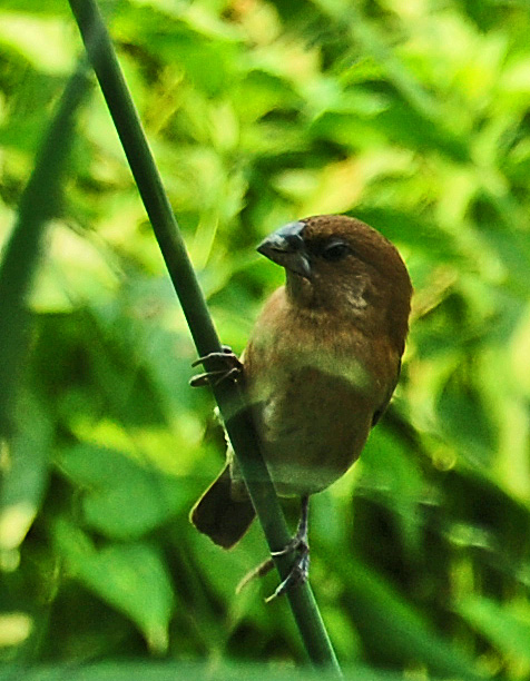 Lonchura punctulata, juvenile. From Bogor, West Java, Indonesia